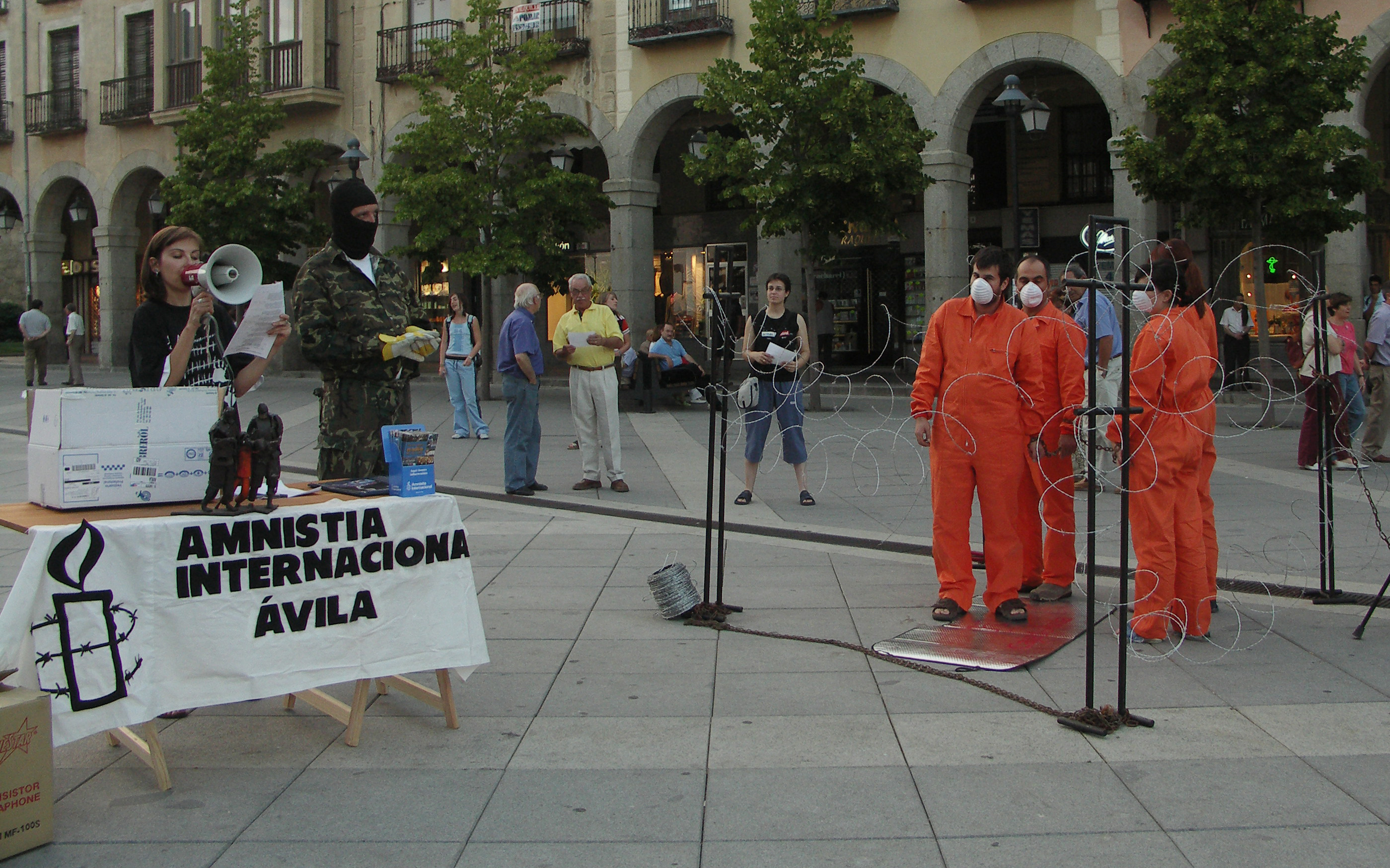 Acto realizado por Amnistía Internacional en Ávila por el cierre del centro de detención de Guantánamo